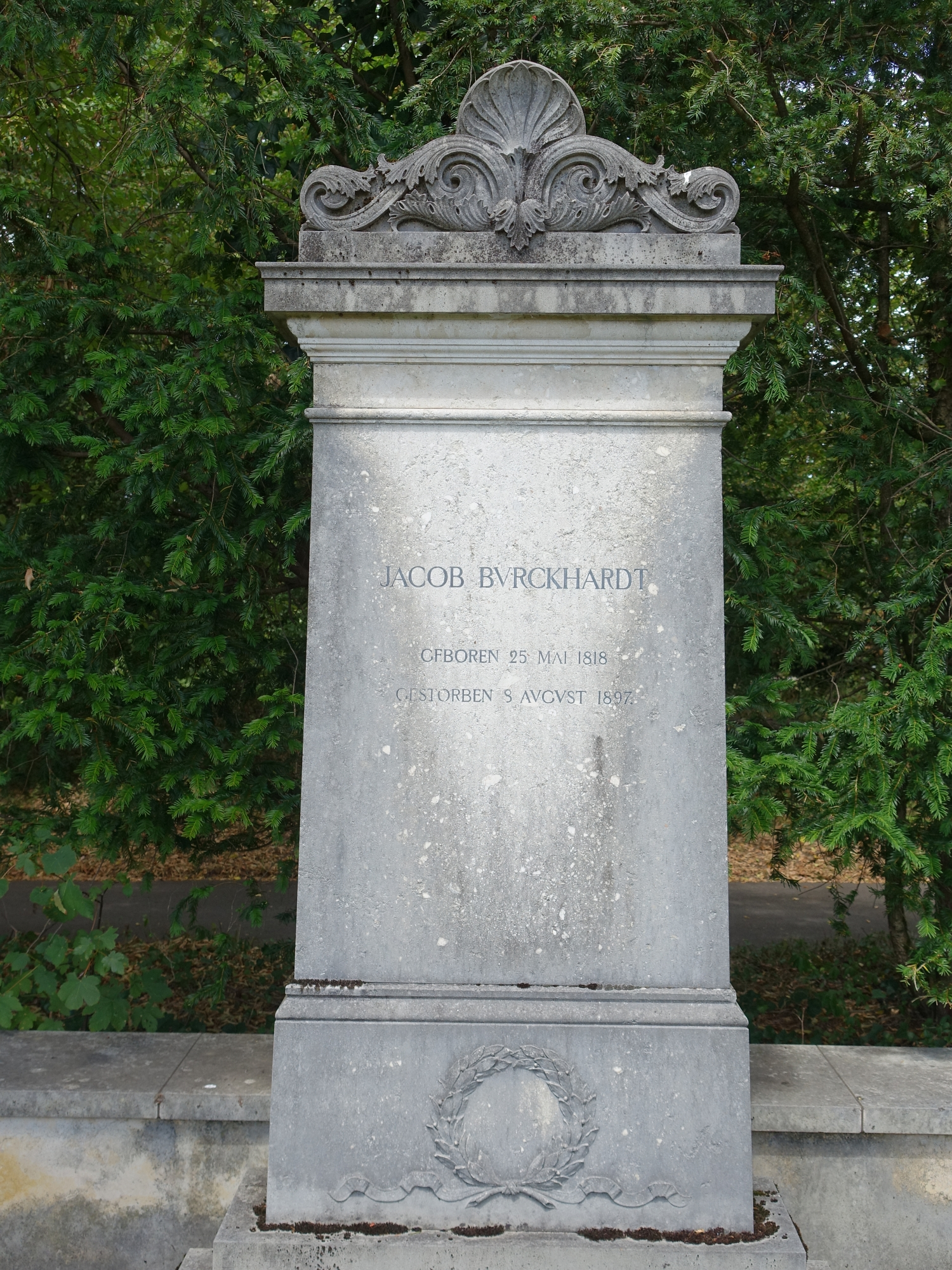 Ehren-Grab für Jacob Burckhardt (1818–1897) auf dem Friedhof am Hörnli, Riehen. Standort 47° 34′ 0.2″ N, 7° 38′ 24.3″ E. Burckhardt hatte schon 1891 schriftlich festgehalten, dass er dort beerdigt werden möchte wo er starb. So fand er auf dem Wolfgottesacker seine (vorläufig) letzte Ruhestätte. Denn bereits 1930 wurde durch die Witwe Bertha Stromboli-Rohr gewünscht, dass Burkhardt wie schon sein Vater, im Kreuzgang des Basler Münster bestattet wird. Daraus wurde nichts. Schlussendlich ist Burckhardt erst am 14. Oktober 1936 exhumiert und der Holzsarg auf das Hörnli überführt worden.